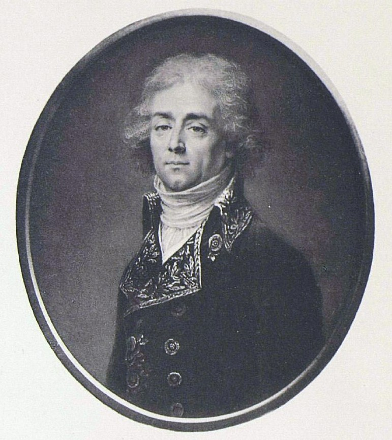 Граф Юрий Александрович Головкин (1764-1846)